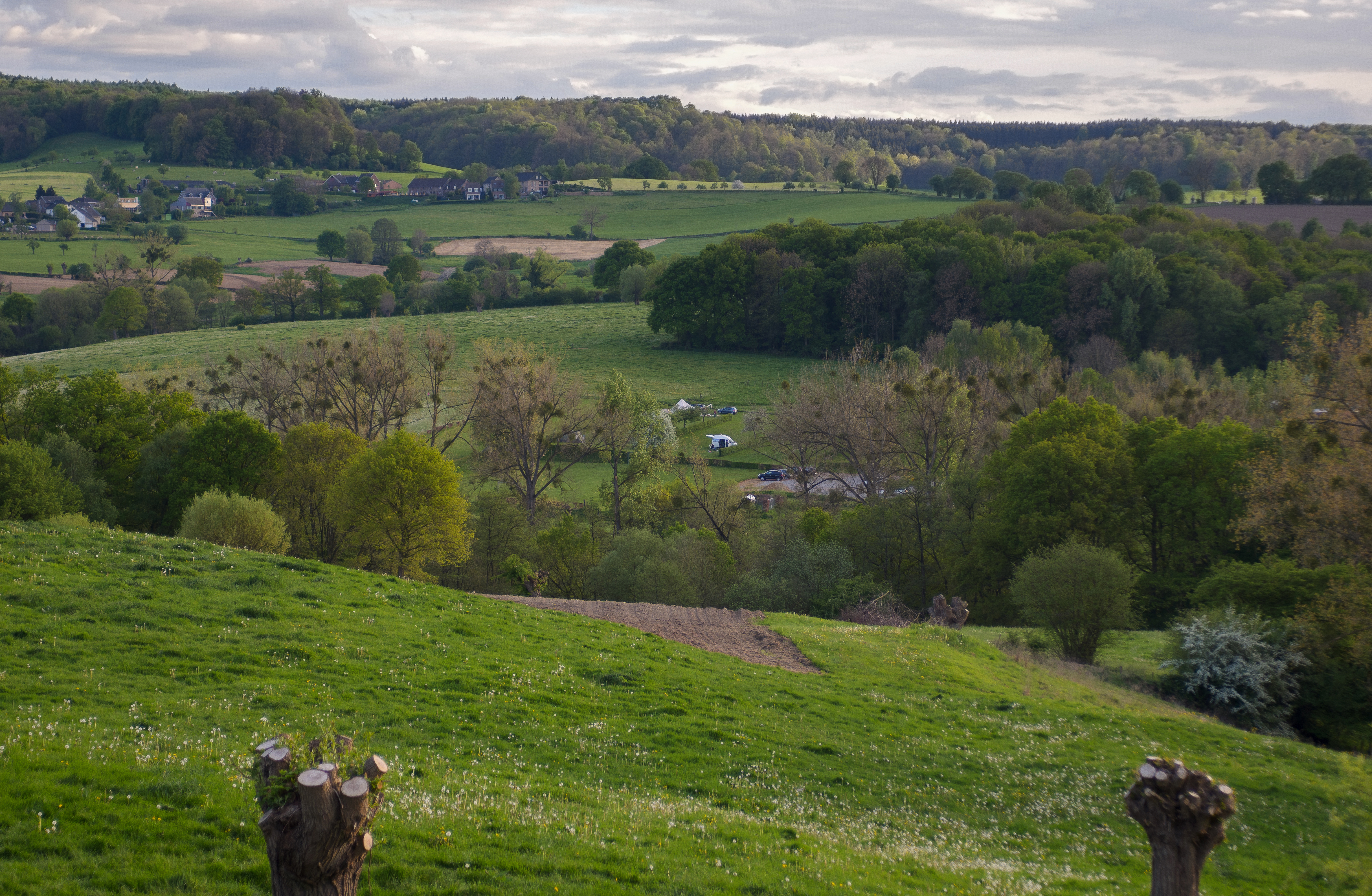 uitzicht op het Geuldal nabij Camerig, niet ver van Epen